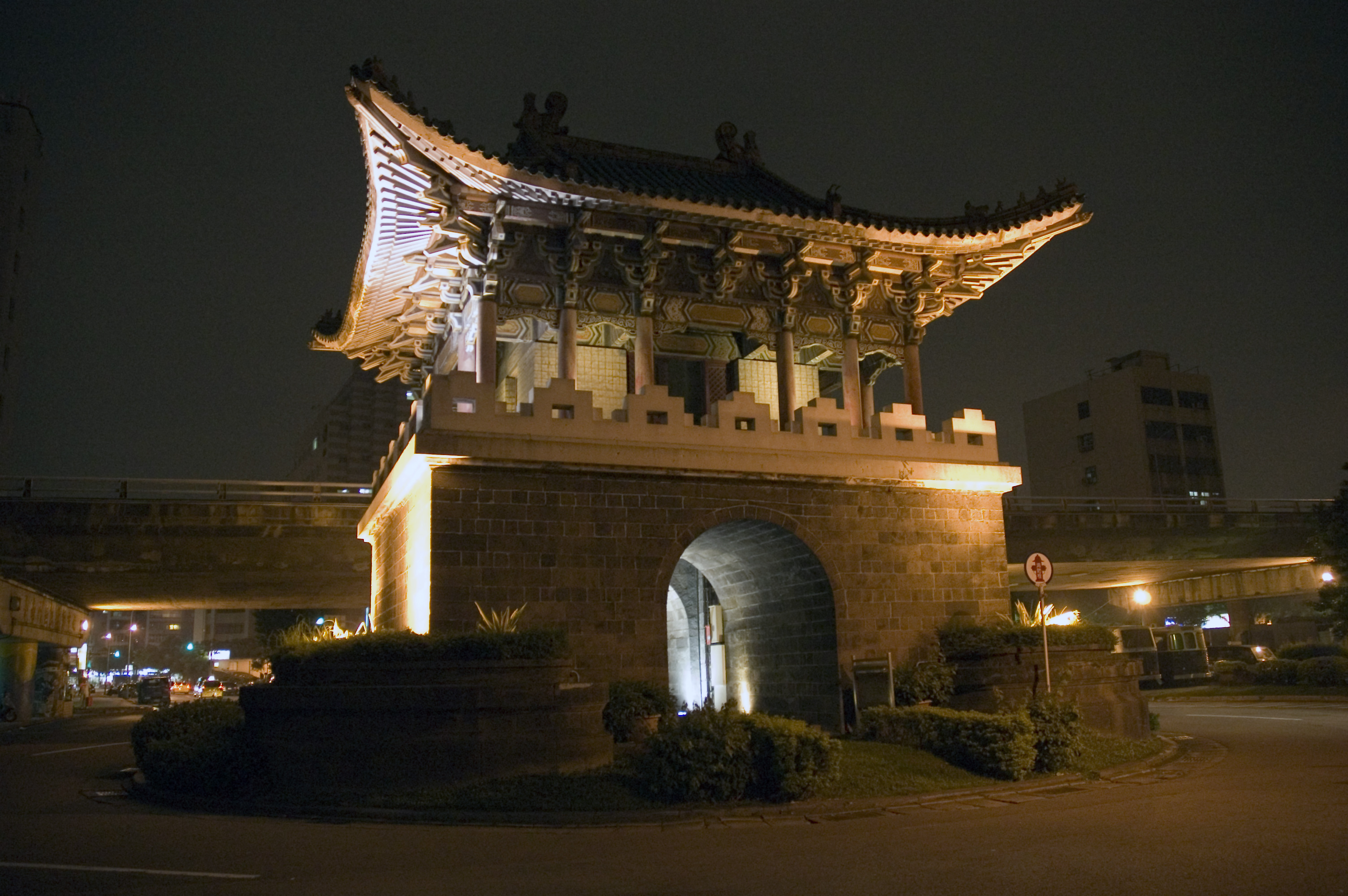 中文（台灣）: 臺北府城小南門（重熙門）北面夜景。